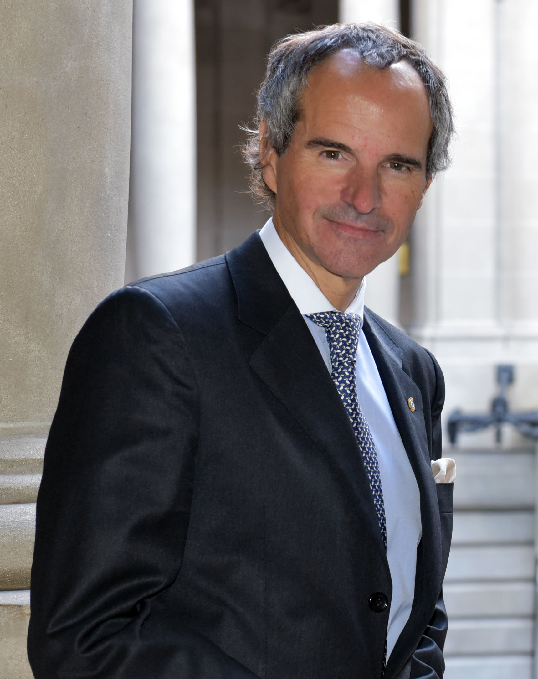 El Canciller anunciará oficialmente la candidatura de Rafael Grossi, experto de gran trayectoria El Canciller Jorge Faurie presidirá este viernes 2 agosto en el Palacio San Martín la presentación oficial del embajador Rafael Grossi como candidato argentino para ocupar el cargo de Director General del Organismo Internacional de Energía Atómica (OIEA), el más importante foro mundial en temas nucleares.